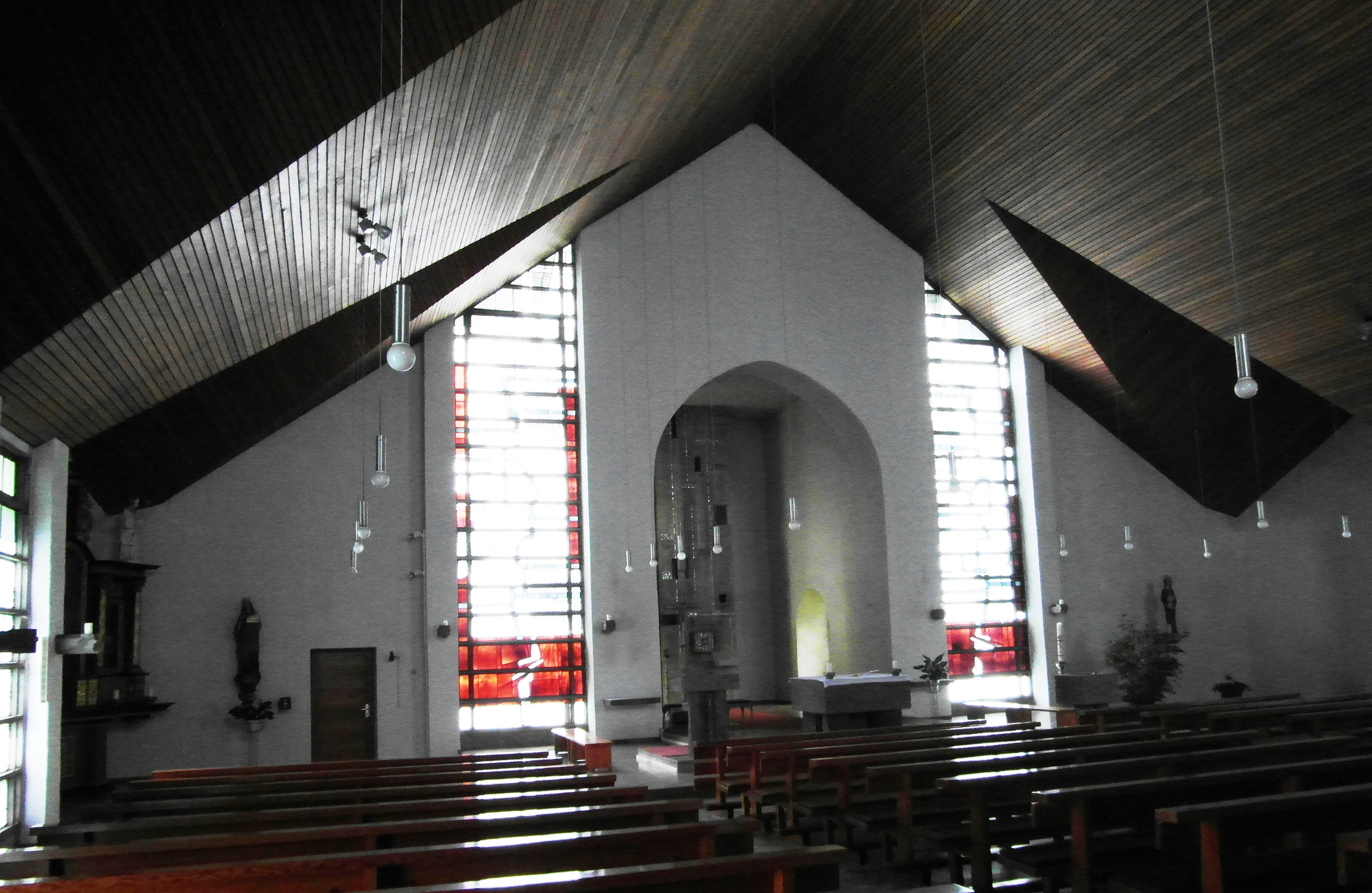 schlicht gehaltene Innenansicht der Pfarrkirche in Wenholthausen (Eslohe)